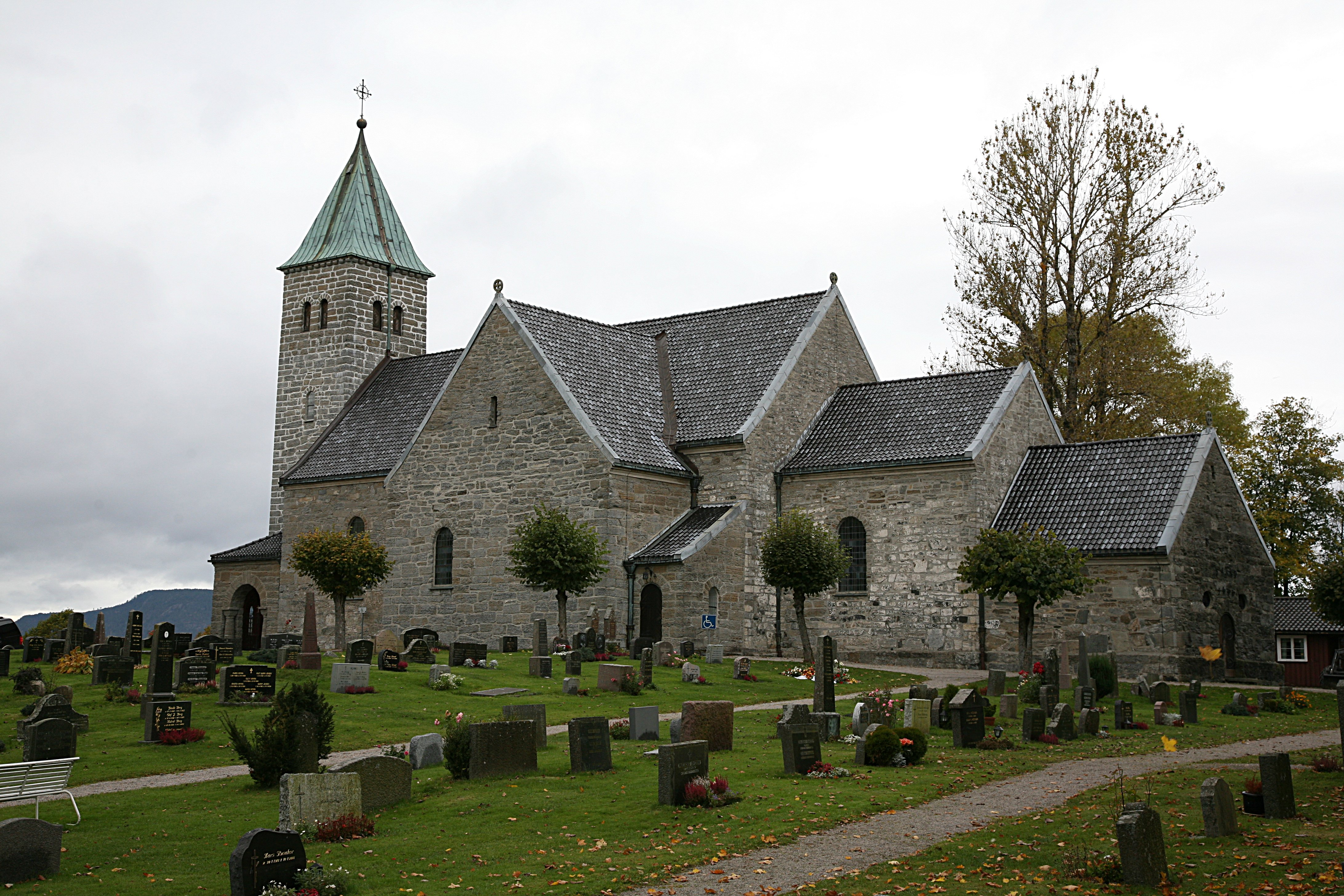 Gjerpen kirke. A church in Skien, Telemark, Norway.